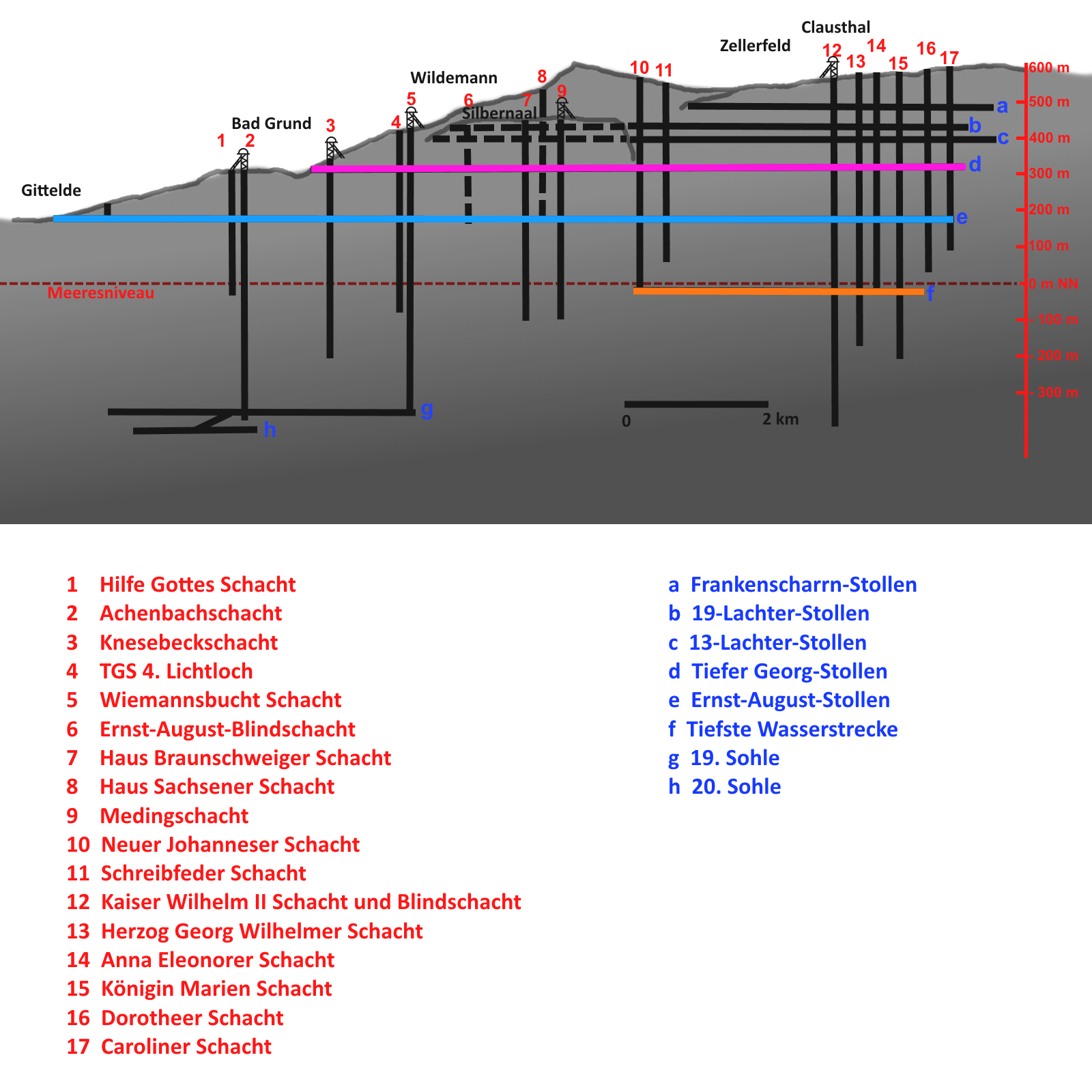 Die beiden großen Wasserlösungsstollen des Oberharzes im Grundriss und in einem fünffach überhöhten Profilschnitt mit den angeschlossenen Hauptschächten. Eigene Arbeit basierend auf "Historischer Bergbau im Harz", Wilfried Ließmann, 3. Auflage, Springer Verlag, Heidelberg 2010, S. 173